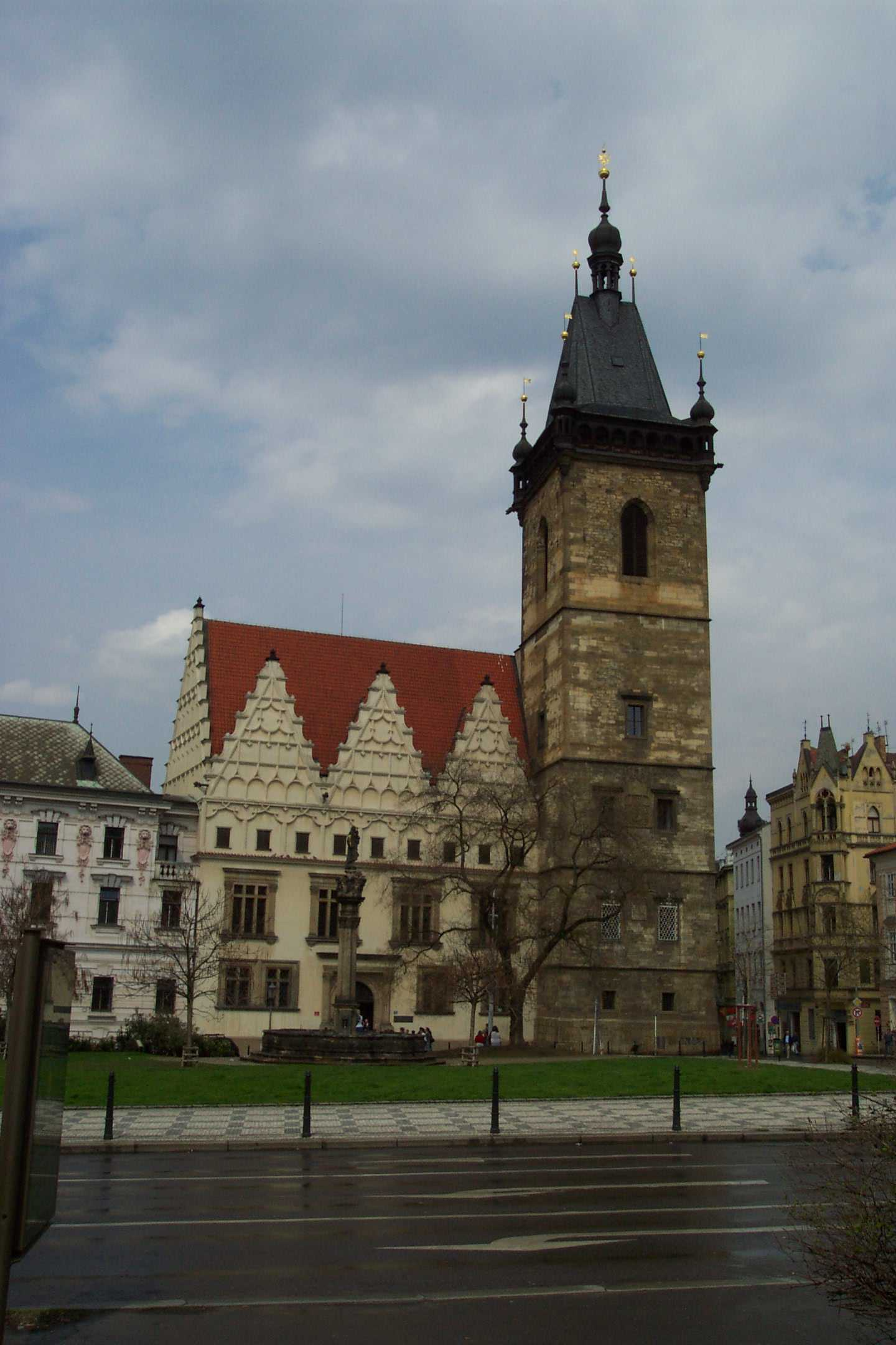 New Town city hall - Novoměstská radnice